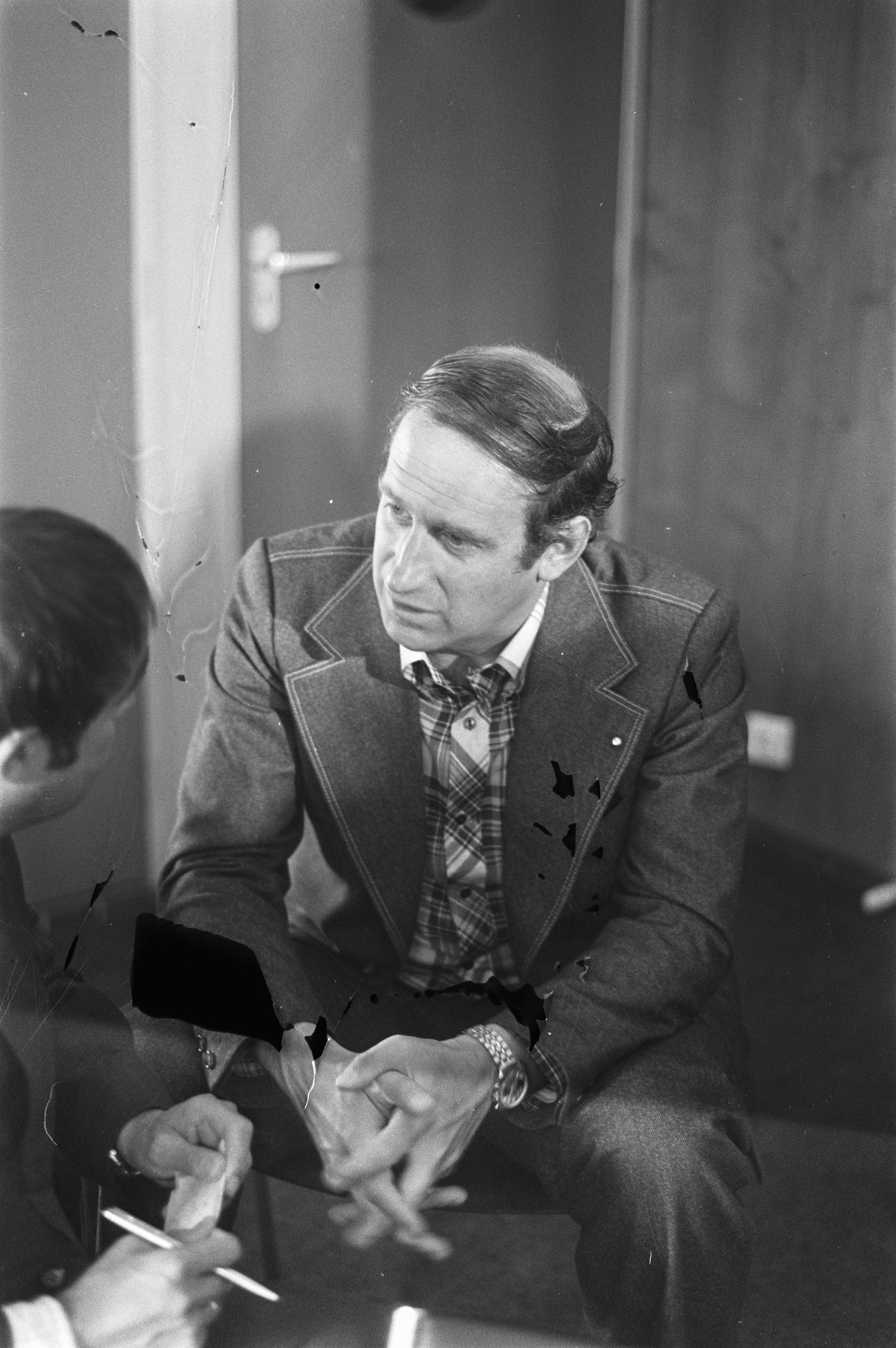 Collectie / Archief : Fotocollectie Anefo Reportage / Serie : Training van Ajax voor de Europacup 1-finale tegen Inter Milaan Beschrijving : Ajax-hulptrainer Han Grijzenhout Datum : 29 mei 1972 Trefwoorden : portretten, sport, trainers, voetbal Persoonsnaam : Grijzenhout, Han Instellingsnaam : Europa Cup, Inter Milaan Fotograaf : Hans Peters / Anefo Auteursrechthebbende : Nationaal Archief Materiaalsoort : Negatief (zwart/wit) Nummer archiefinventaris : bekijk toegang 2.24.01.05 Bestanddeelnummer : 925-6256